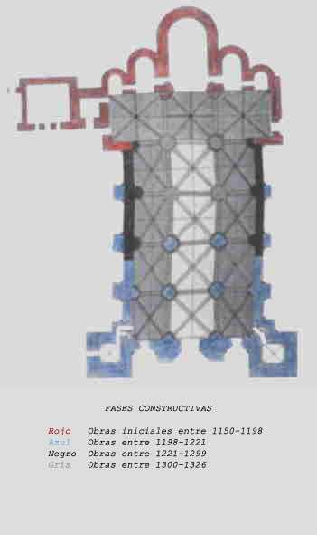 Fases de la construcción de la Catedral de Sigüenza.